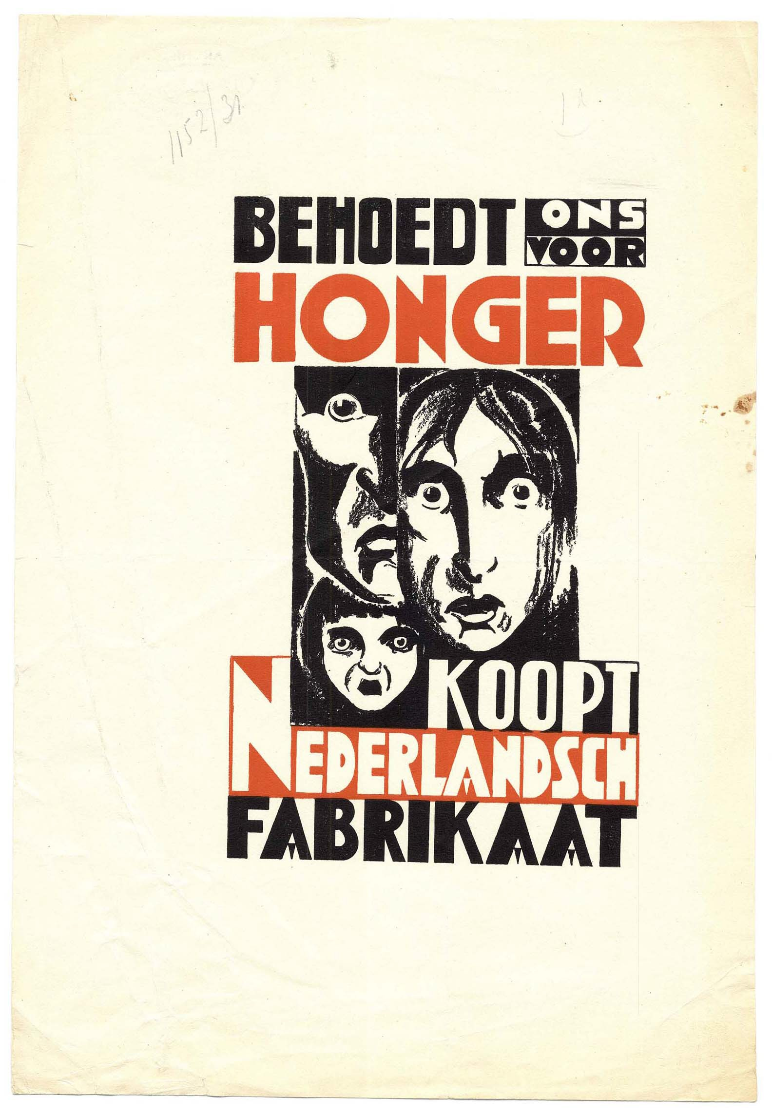 Behoedt ons voor honger. Koopt Nederlands Fabrikaat